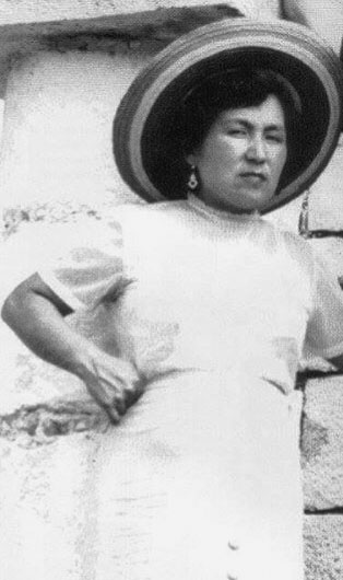 Hilda Gadea en 1955